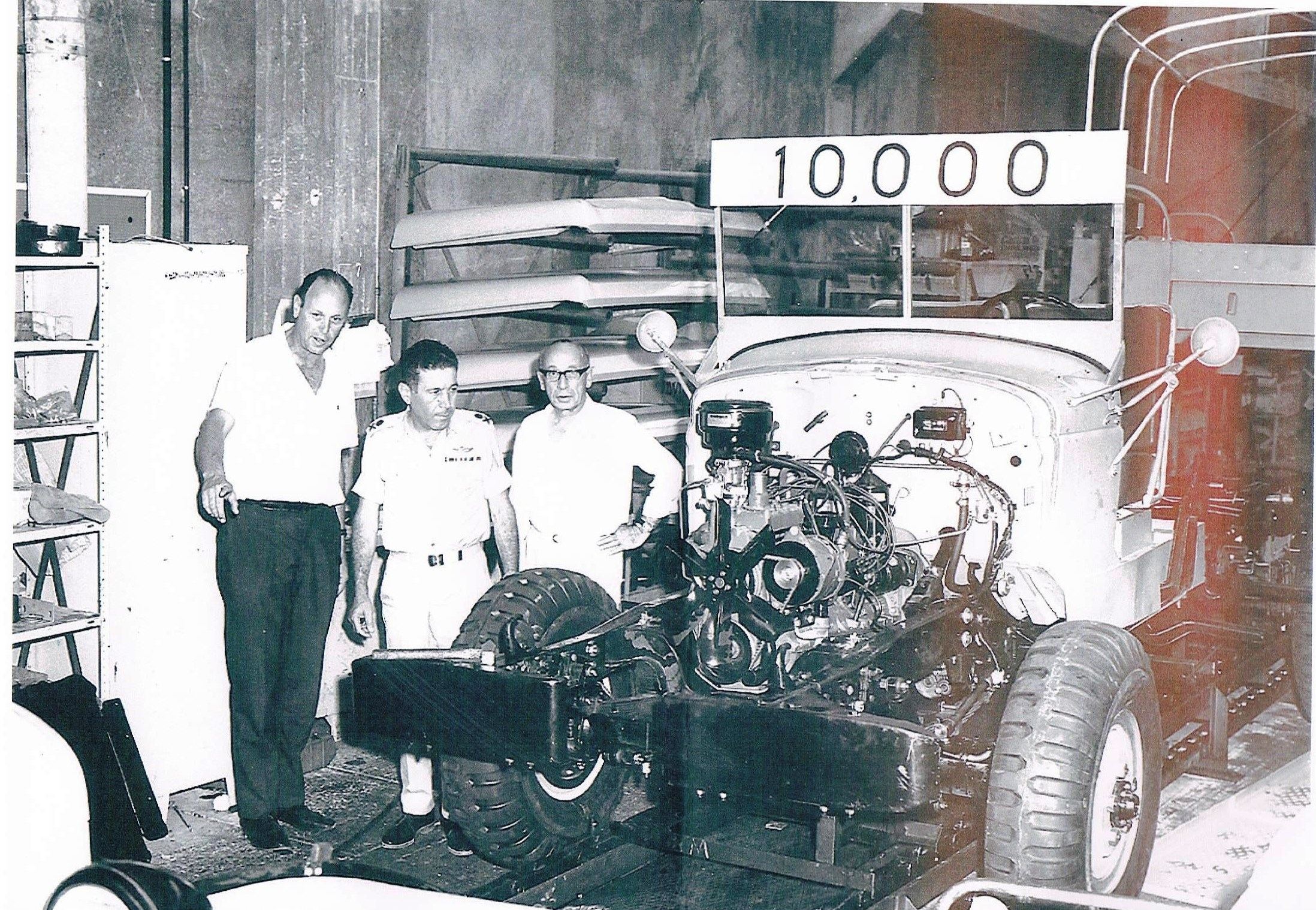 יוסף בוקסנבאום